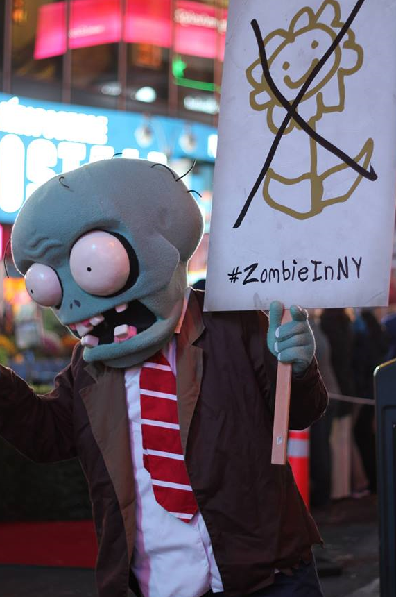 Immagine di un Cosplay a New York al Gamescon